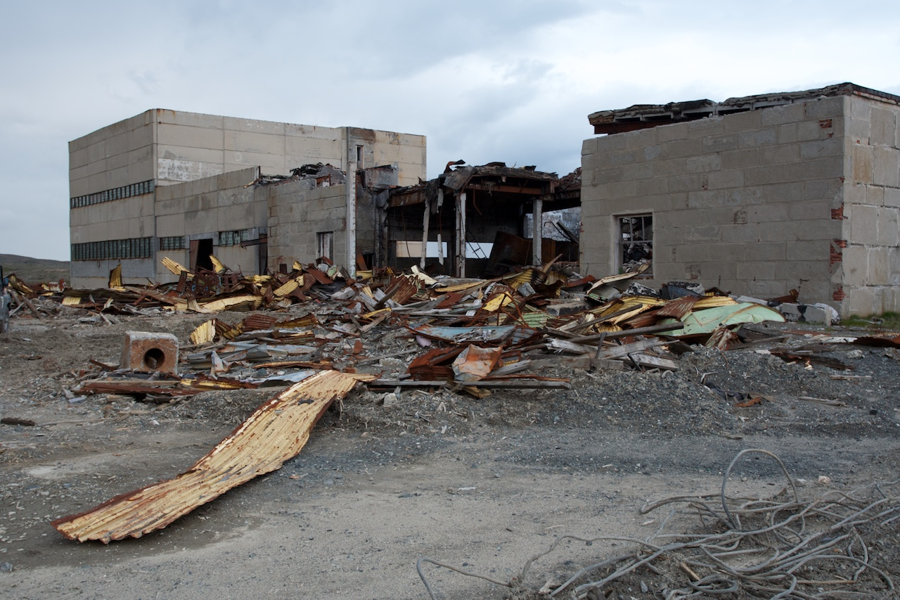 Состояние Кольской сверхглубокой в 2012 году